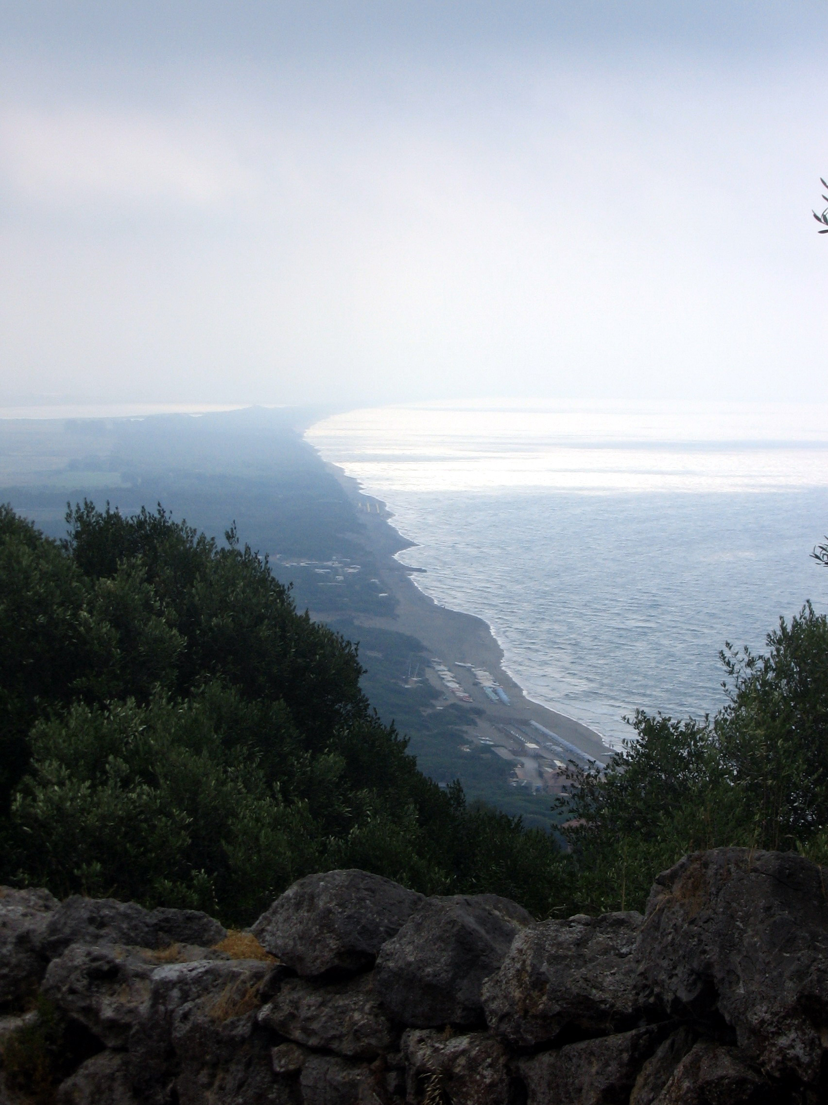 Cosa, Ansedonia, Orbetello, Toscana, Italia